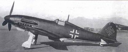 Fiat G.56 i con motore DB.603 Licensing Categoria:Immagini di aeroplani